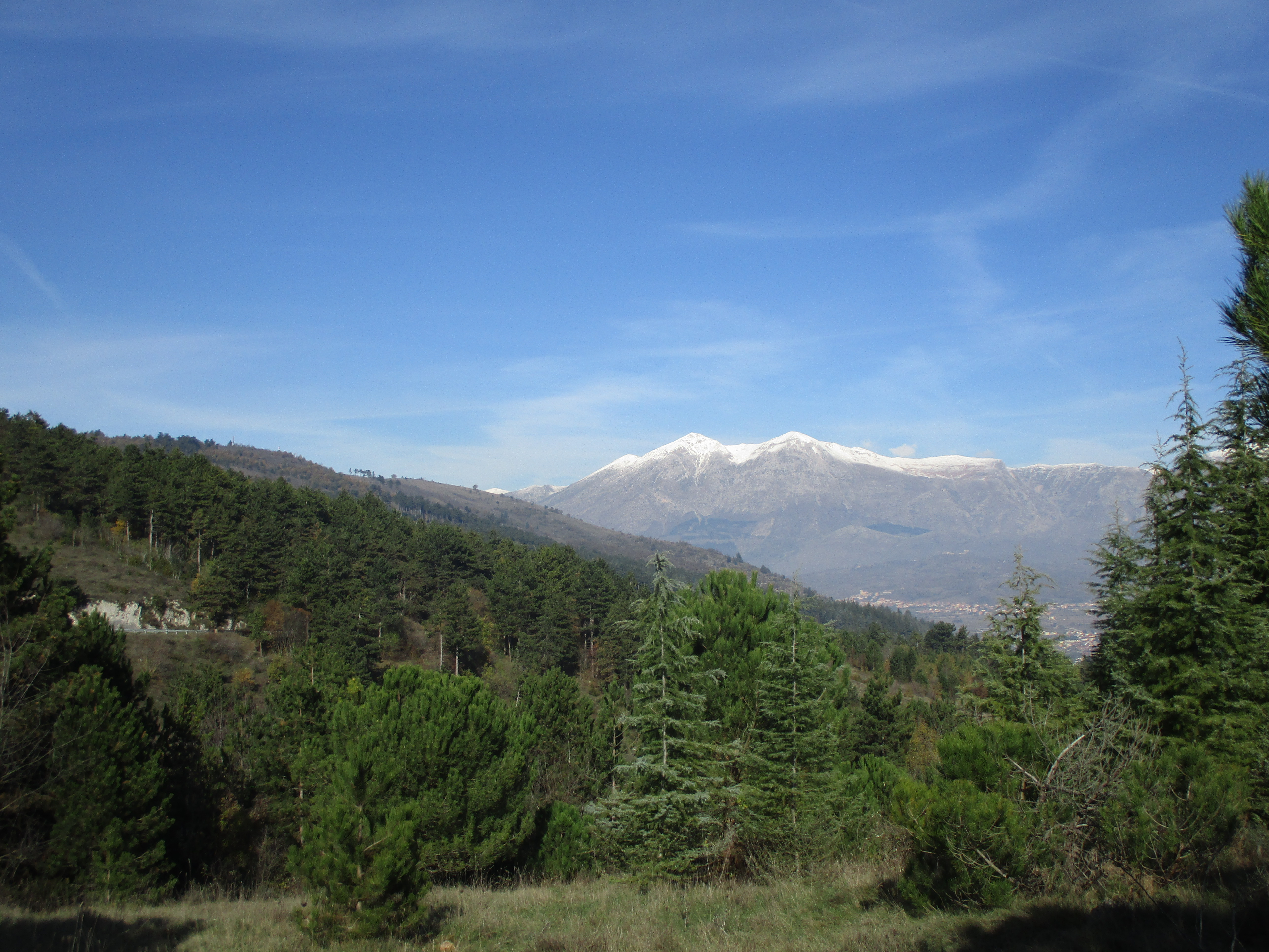 Monte Salviano sullo sfondo le vette del monte Velino